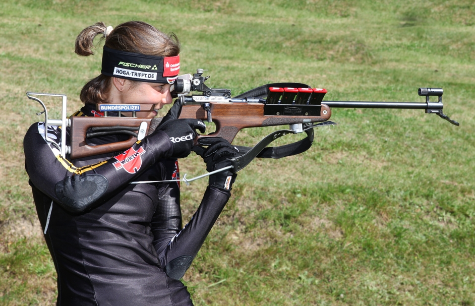 Tina Bachmann, deutsche Biathletin